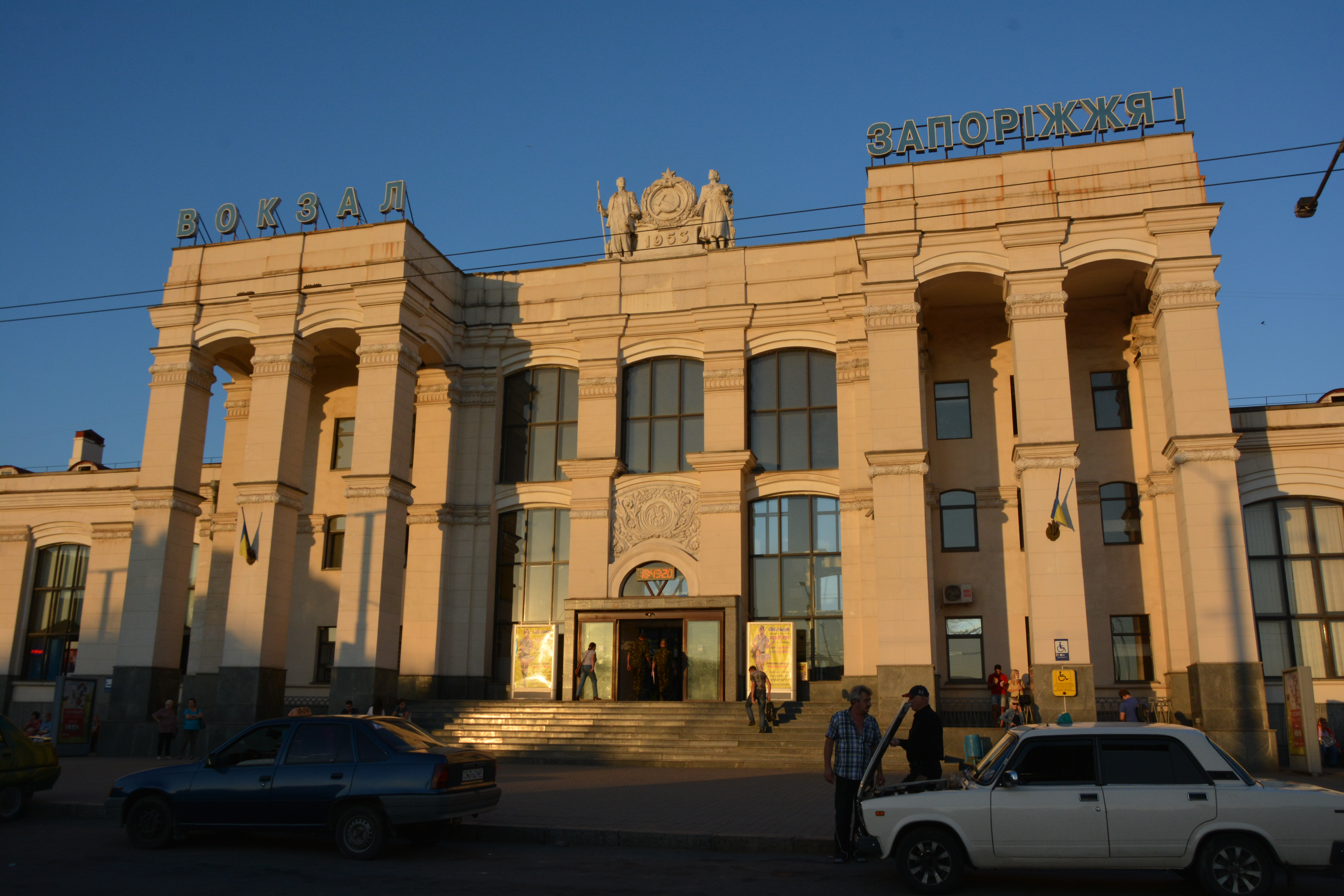 Залізничний вокзал (вокзал Запоріжжя-1), Запоріжжя, пр-т Леніна, 6г